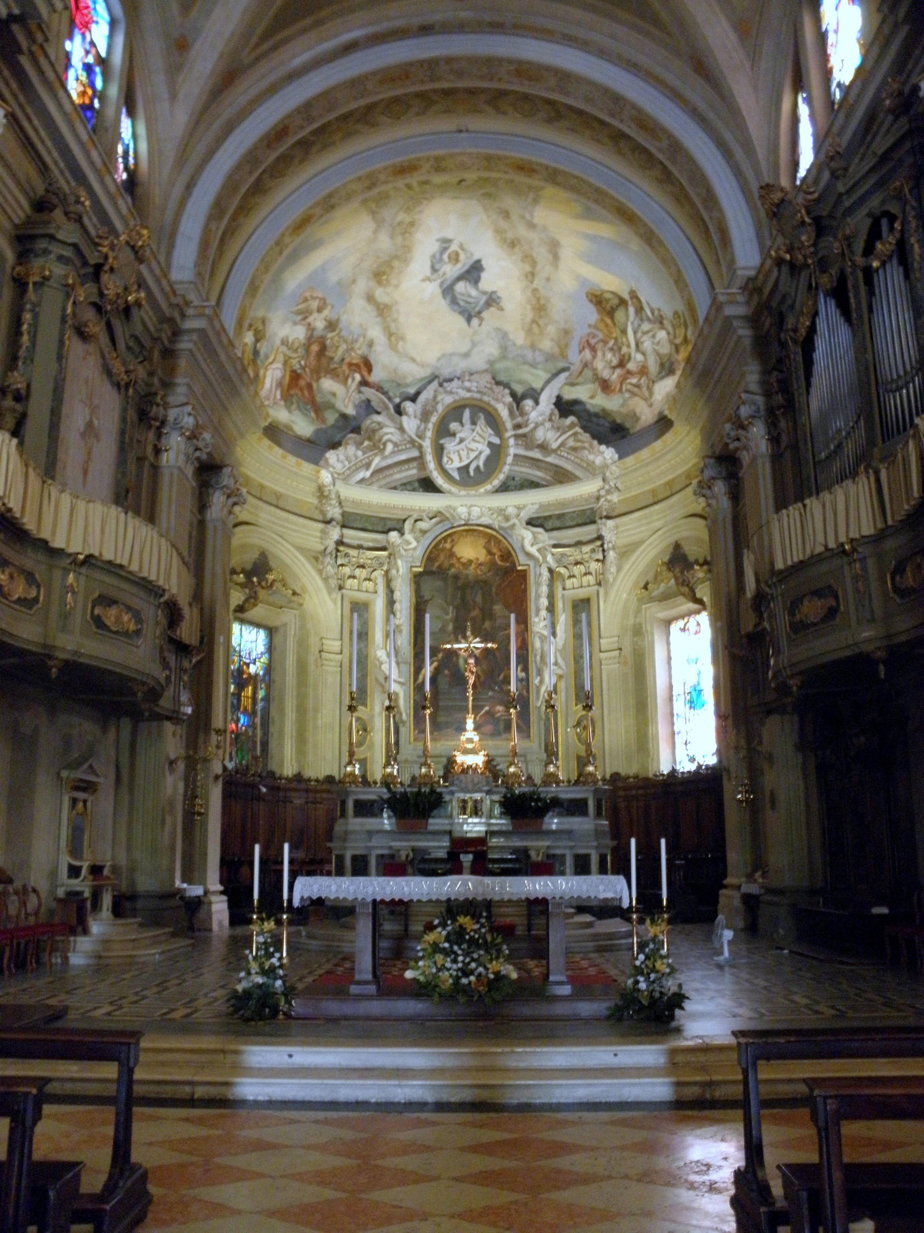 Lendinara, Duomo di Santa Sofia: interno, vista dell'abside con l'altare maggiore.